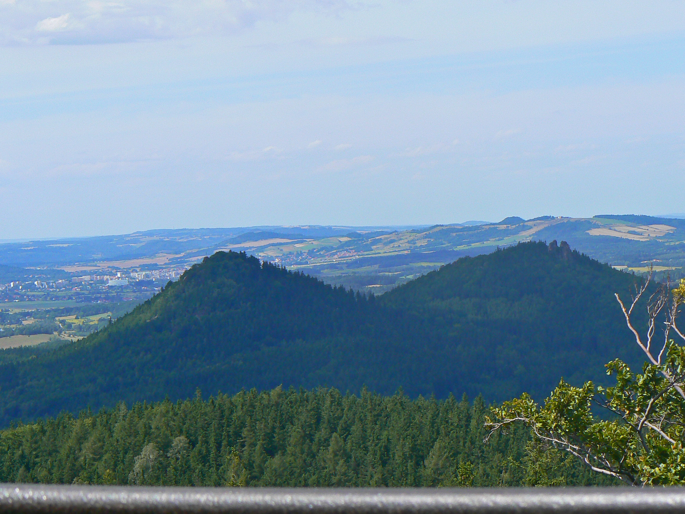 Rudawy Janowickie, widok z Starościńskich Skał w kierunku Gór Sokolich.